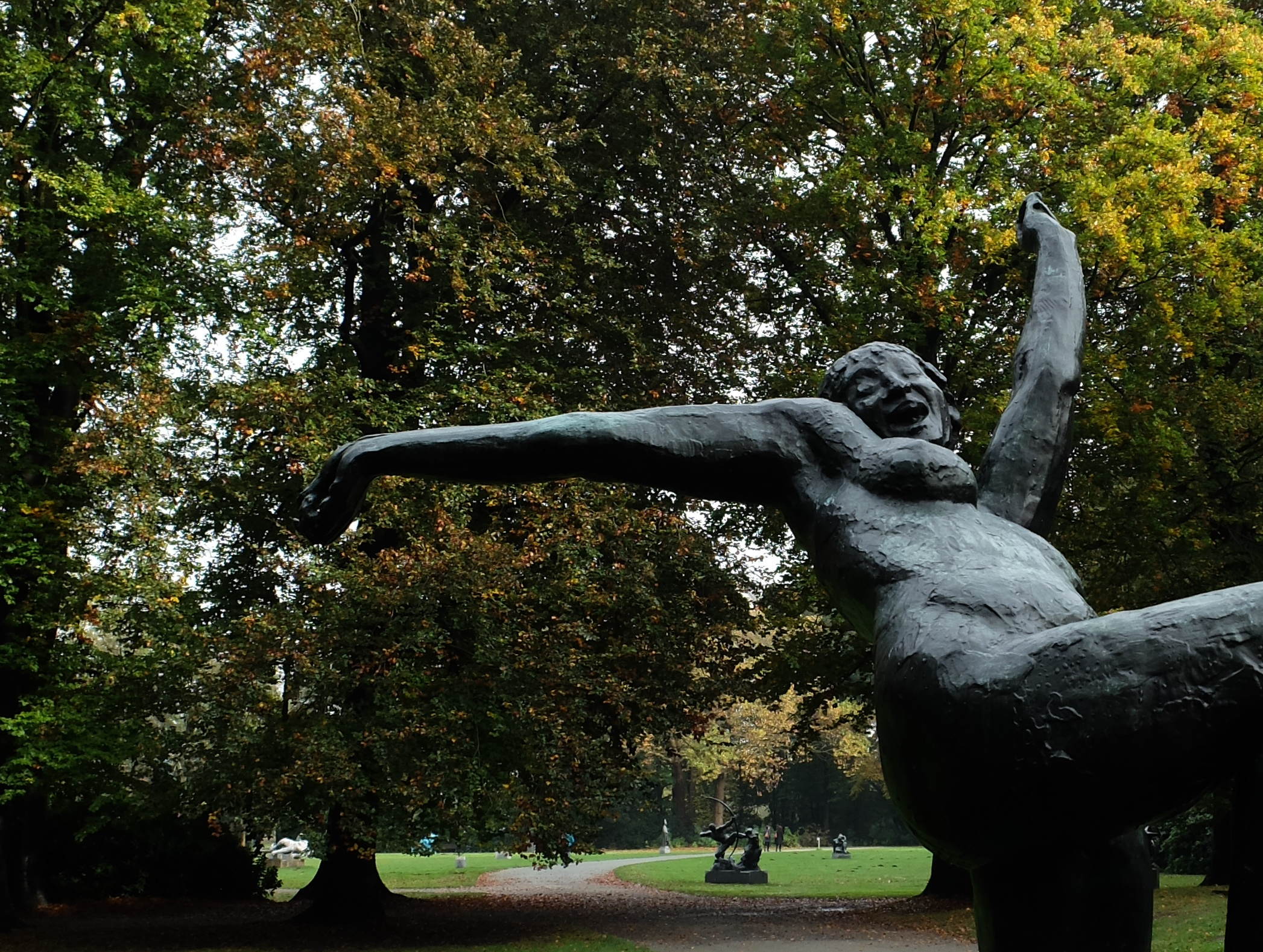 Openluchtmuseum voor beeldhouwkunst Middelheim met op de voorgrond Het zotte geweld van Rik Wouters.